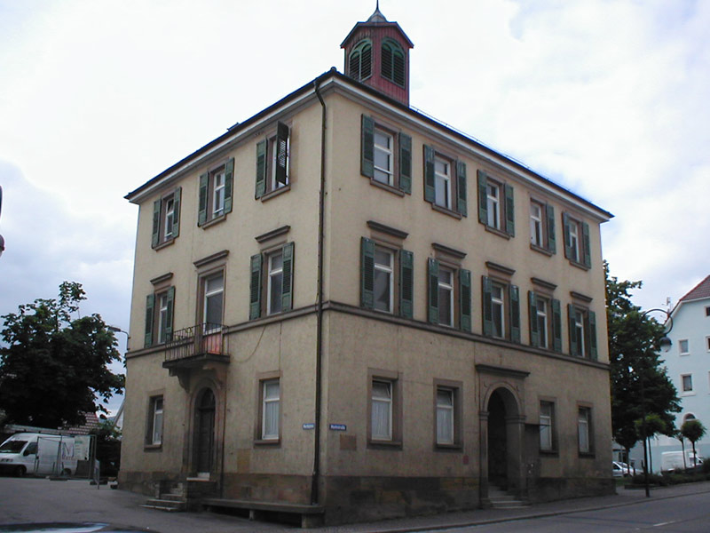 Altes Rathaus in Güglingen, erbaut 1850 nach Stadtbrand